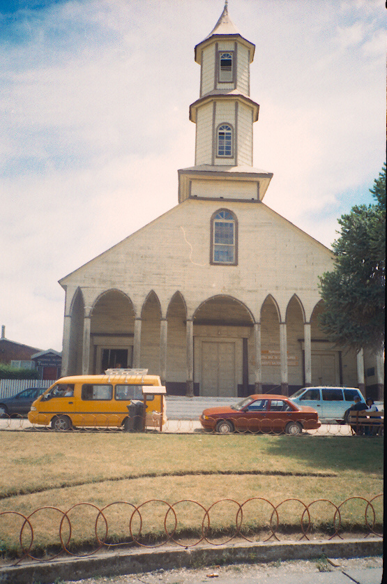 Kendi fotom